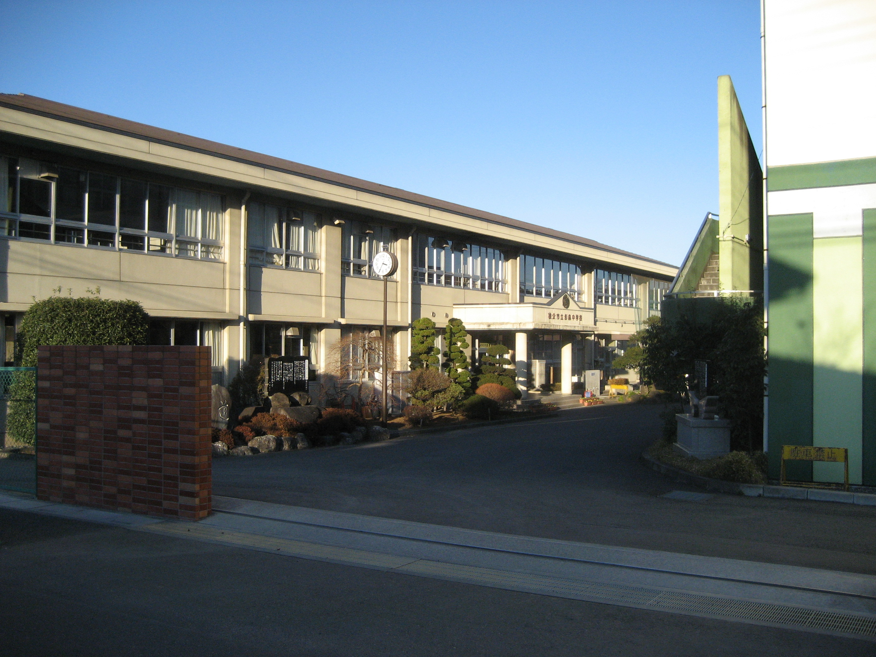 秩父市立影森中学校校舎